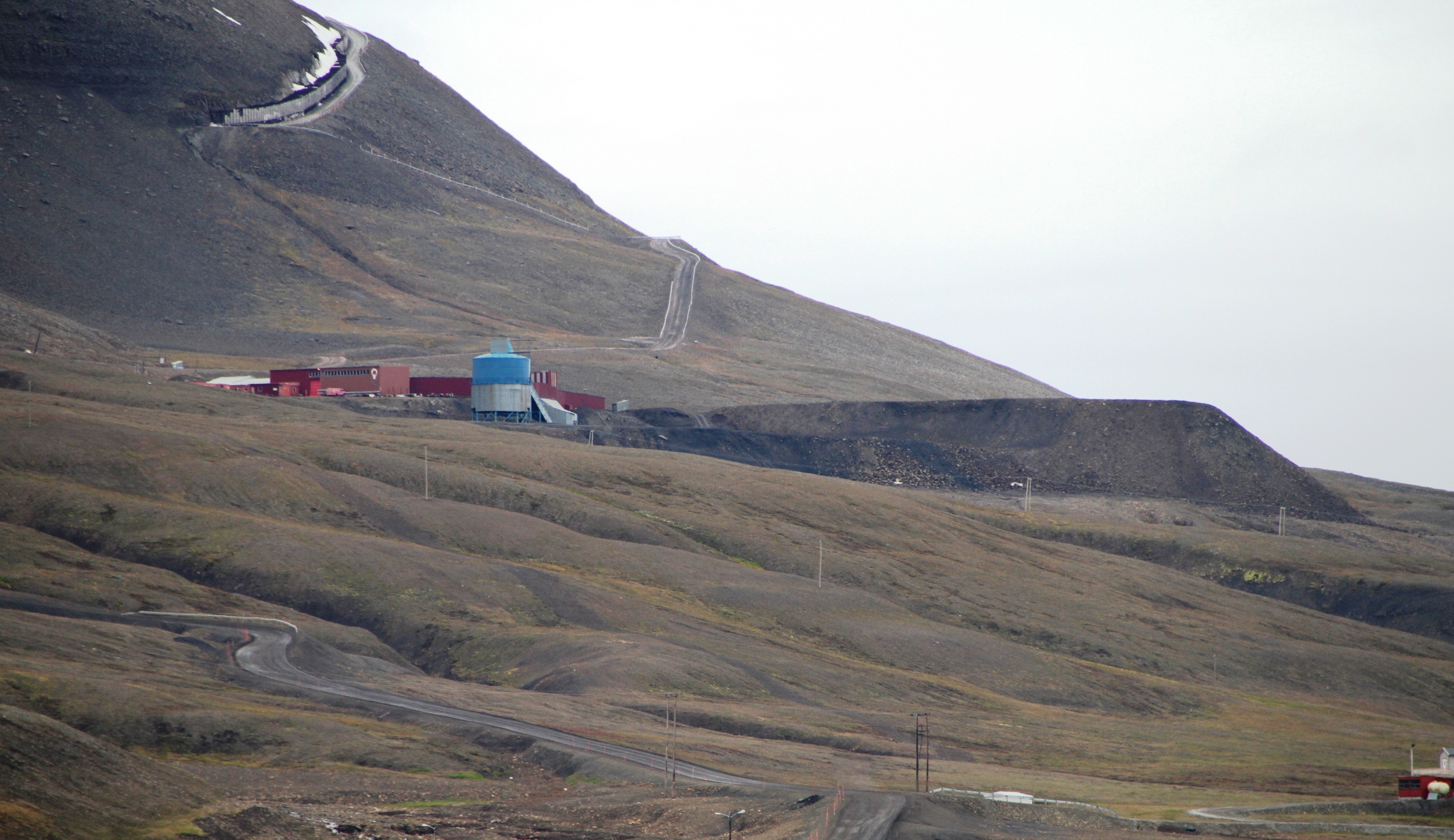 Mine number 3, a cultural heritage site by Longyearbyen, central Spitsbergen, Svalbard.